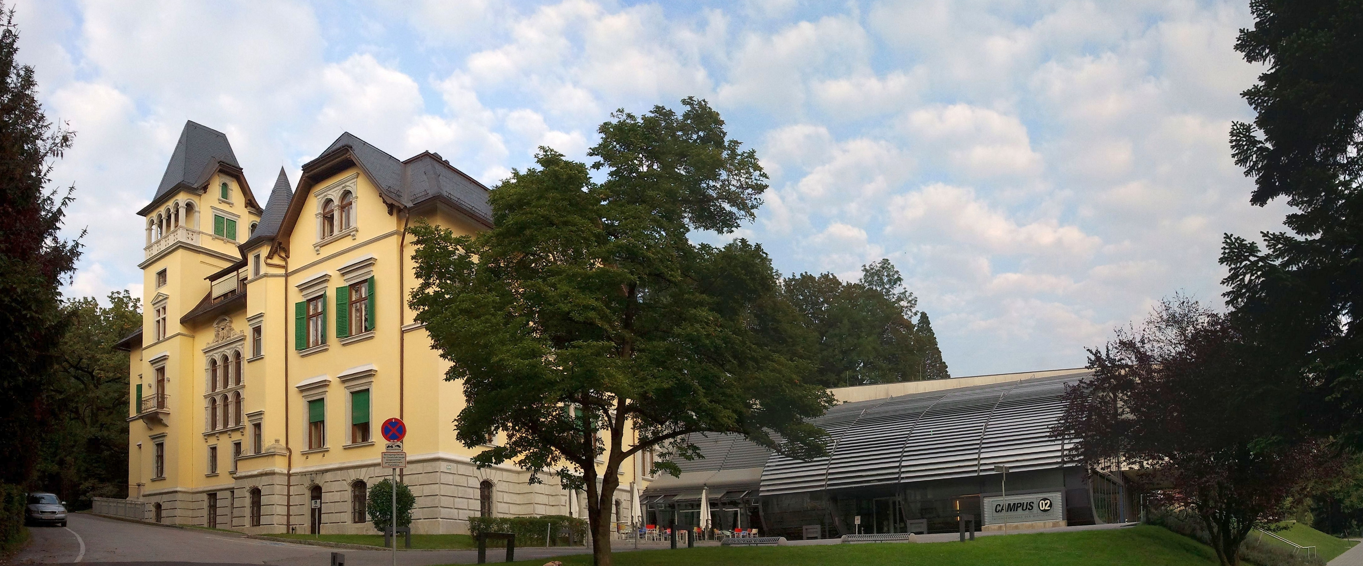 Villa Ferry mit brückenförmigem Übergang in den Garten/ehem. ORF Studio Steiermark (von Südwesten), bei Zusertalgasse 14a, Graz, Österreich